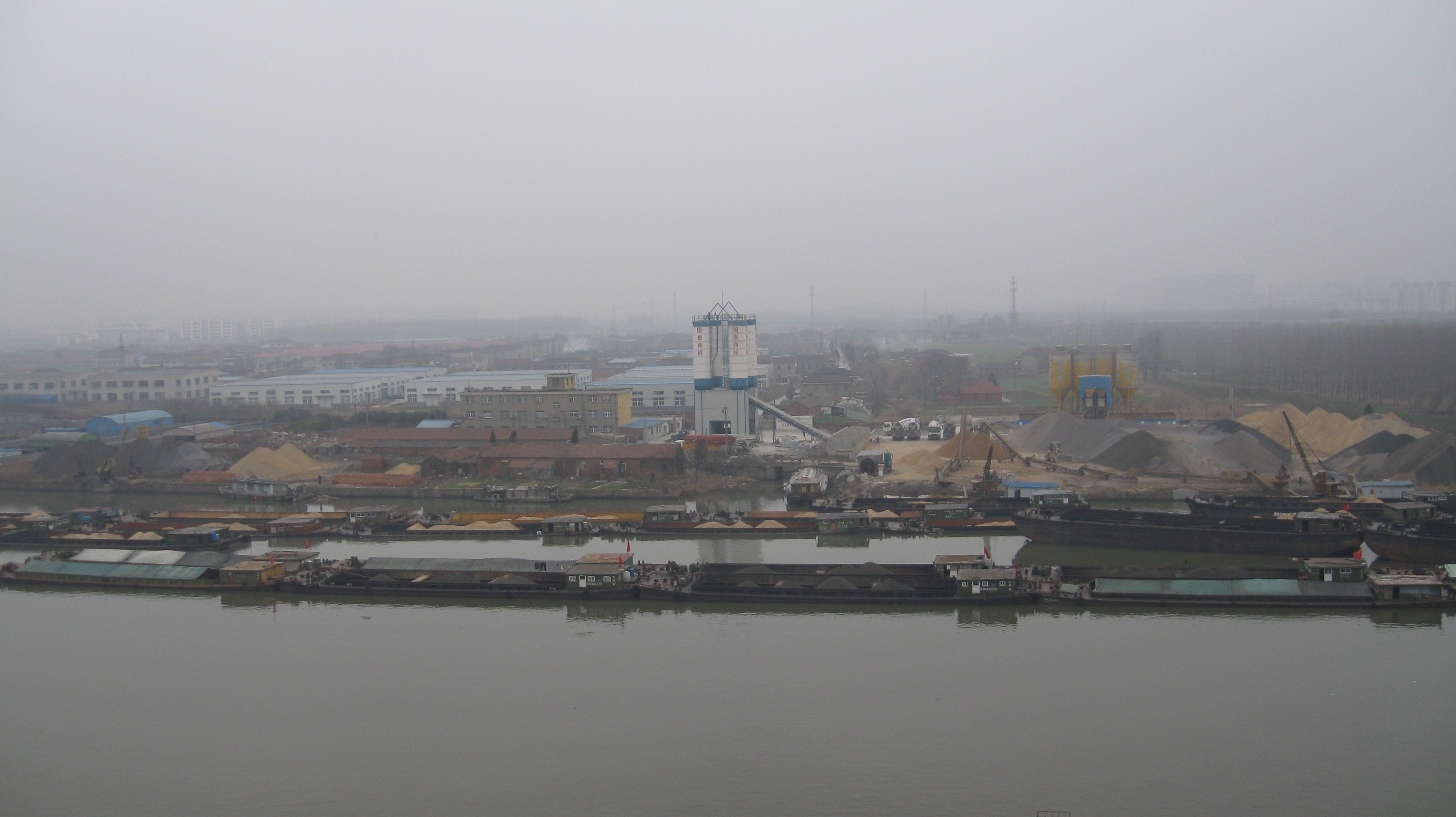 Tinghu, Yancheng, Jiangsu, China